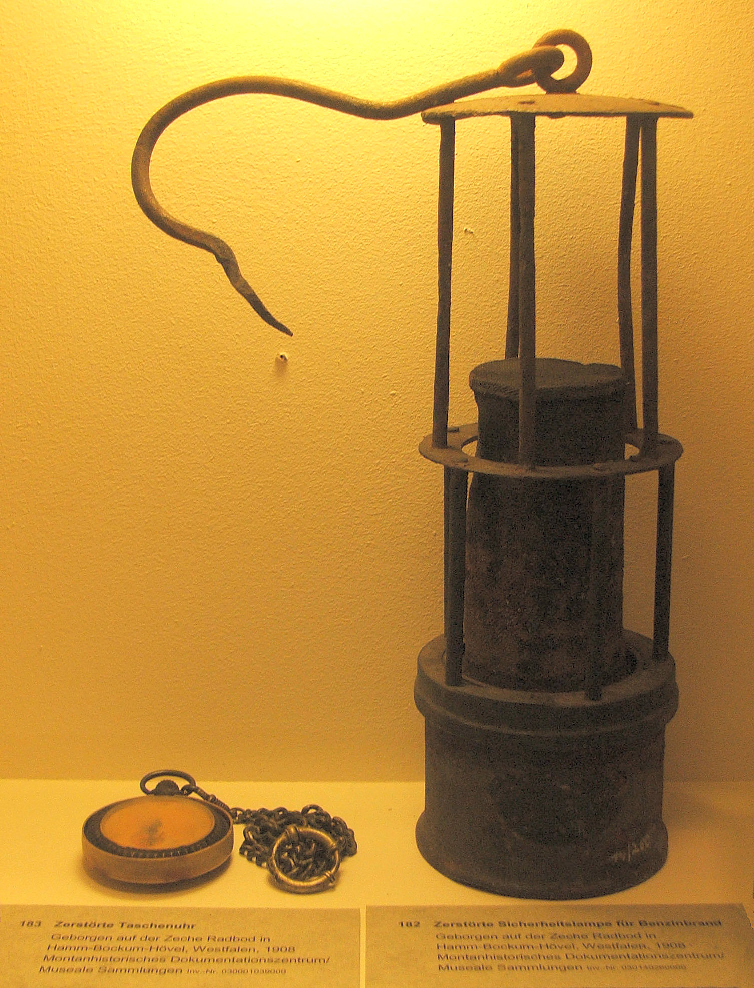 Zerstörte Uhr und zerstörte Sicherheitslampe, geborgen auf Zeche Radbod, nach der Katastrophe von 1908 mit 348 Toten, heute Exponate im Deutschen Bergbaumuseum Bochum